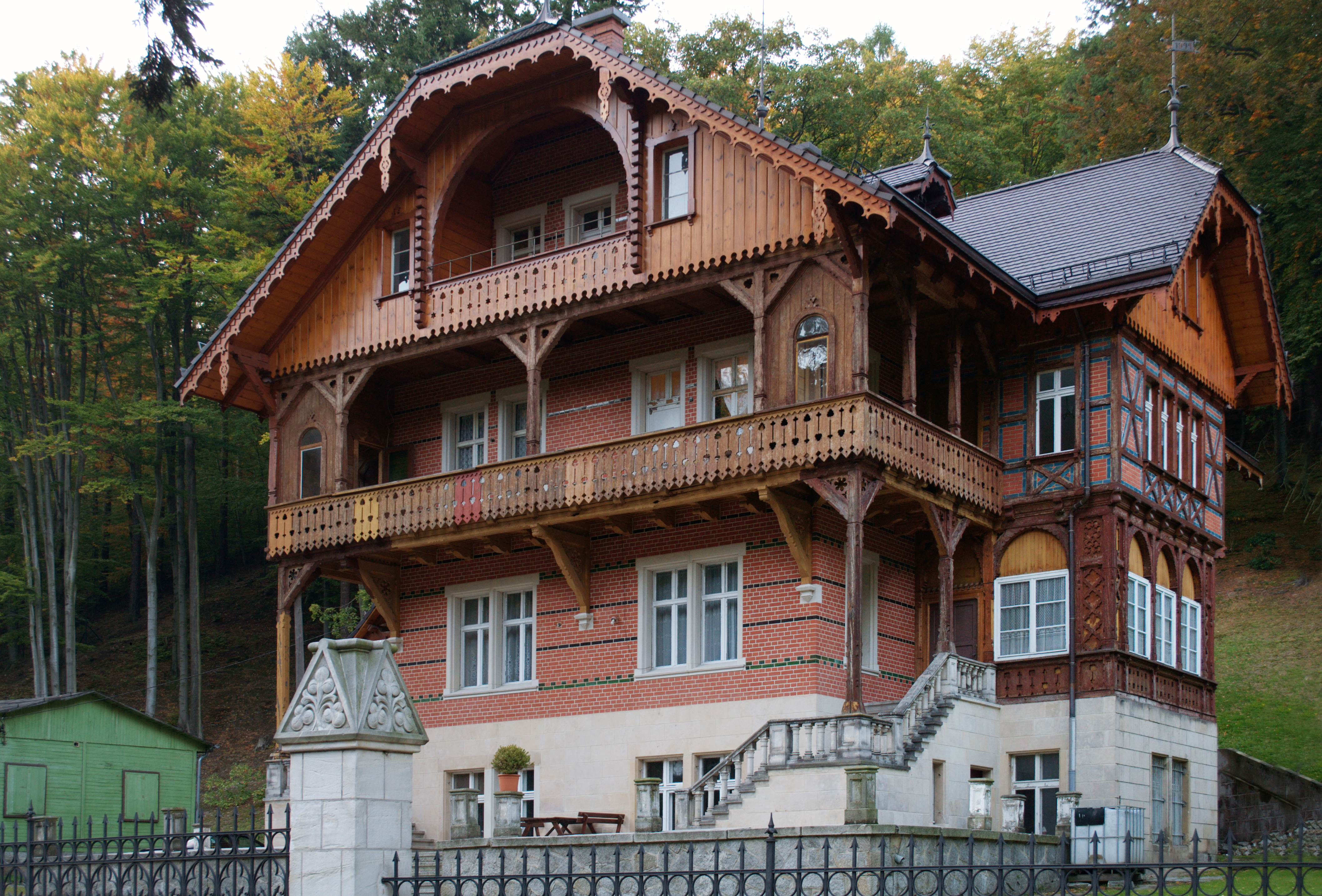 Bielawa, ul. Nowobielawska 89 - dawna willa Dieriga Waldhaus, obecnie pensjonat "Leśny Dworek" (zabytek nr 1364/Wł)